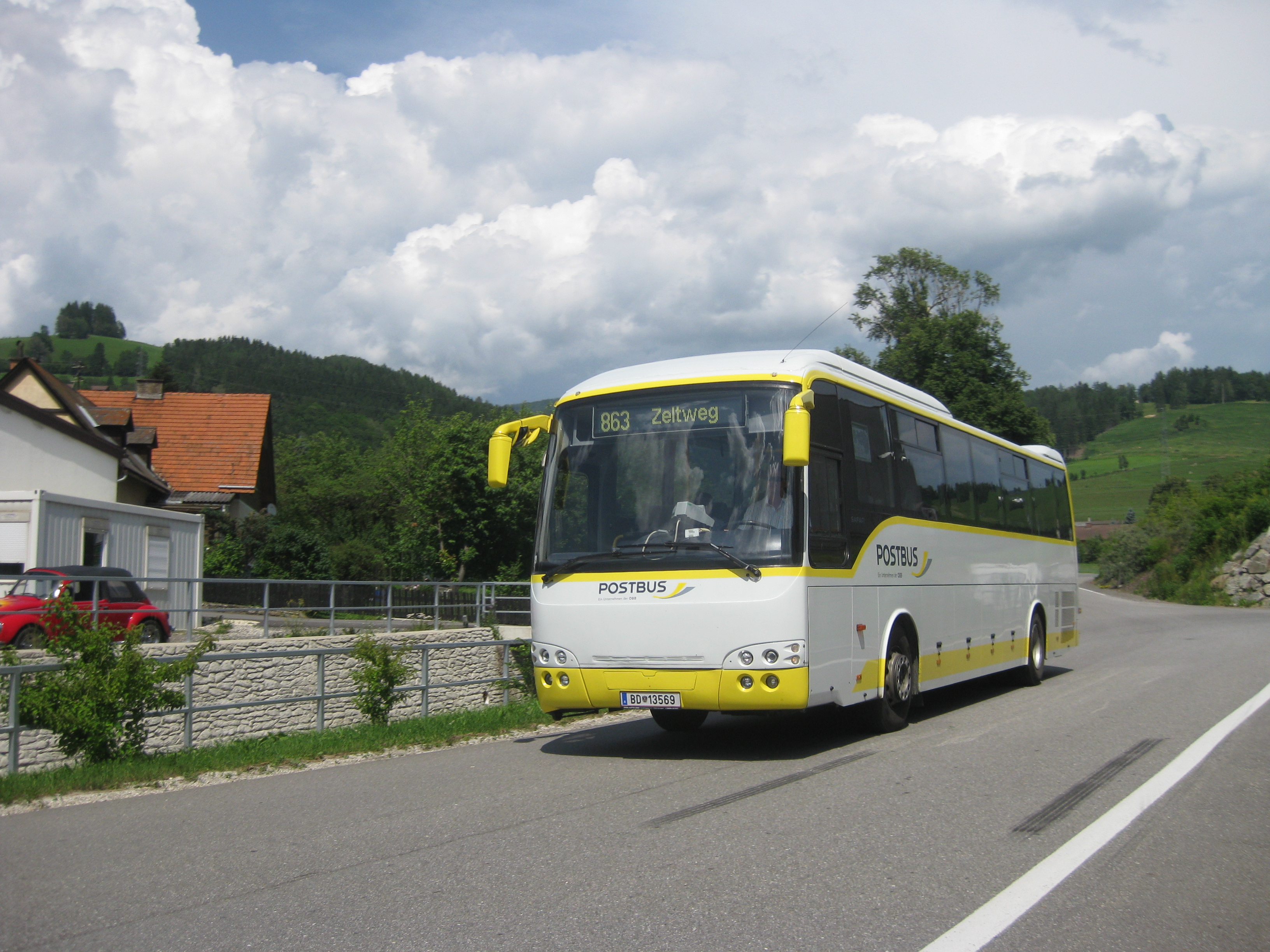 Wisperndorf Bus Ri Zeltweg 12-06-29